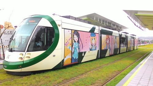 行駛中的高捷少女彩繪輕軌列車於駁二大義站